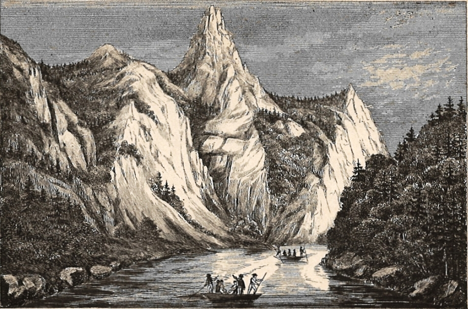 Litografia z przewodnika po Szczawnicy wydanego w Krakowie w 1869 roku